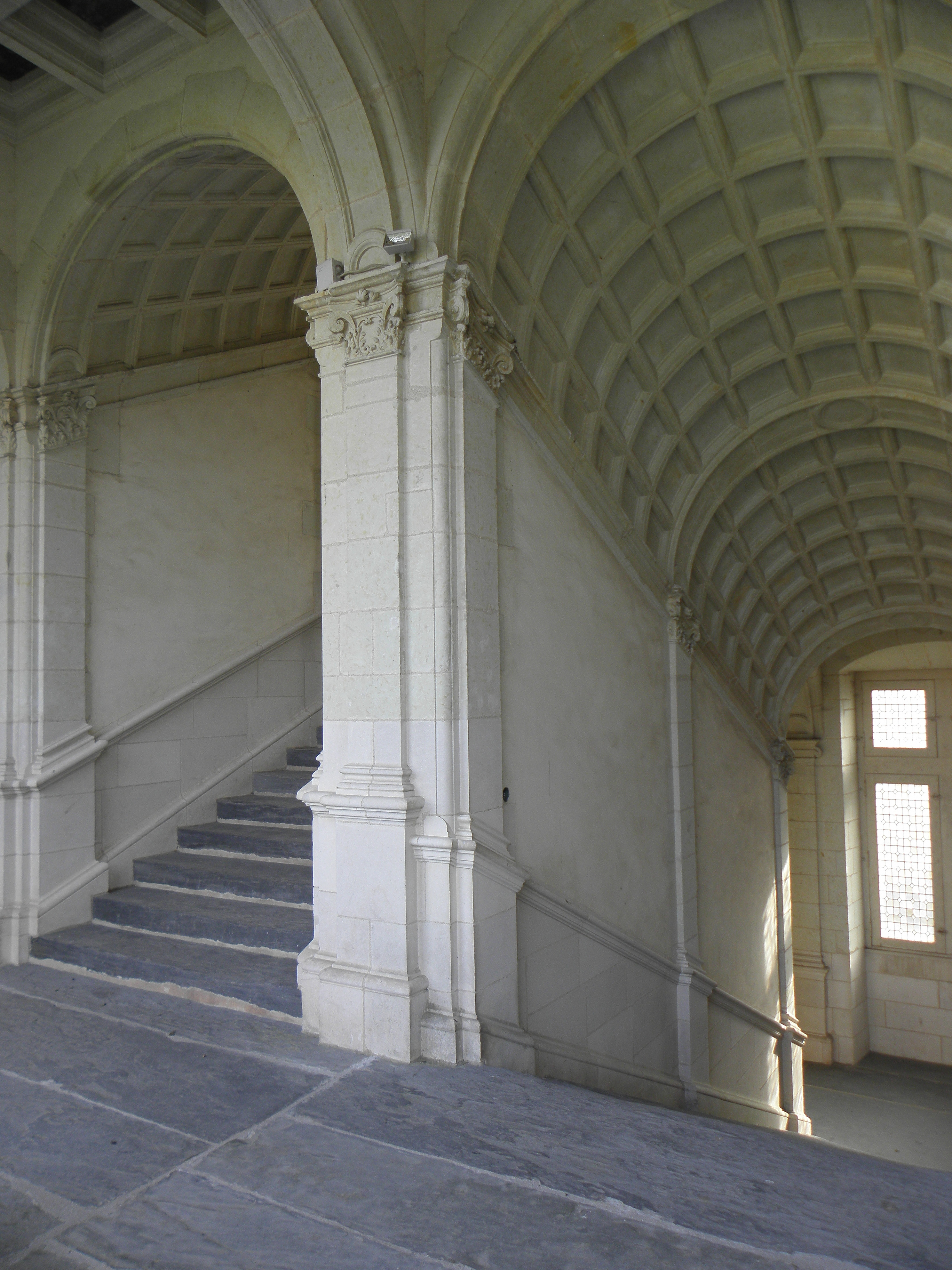 Grand escalier du logis Jean de Laval du Château de Châteaubriant (44).